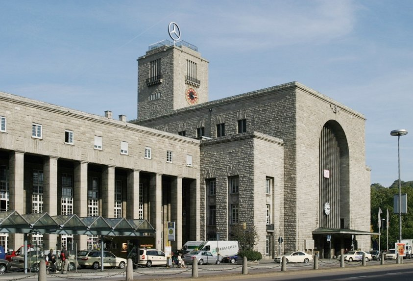 Stuttgart Hauptbahnhof